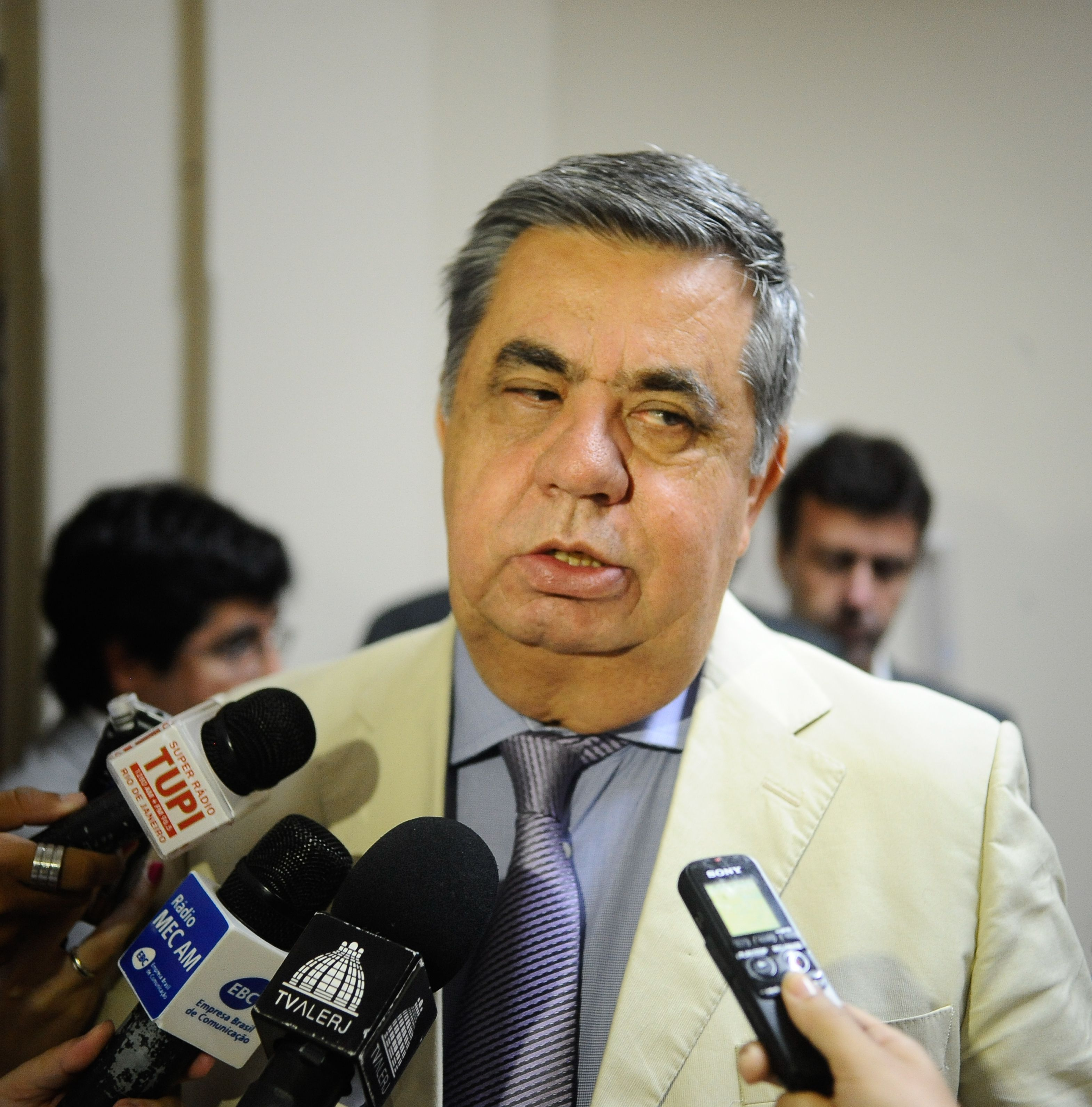 O presidente da Alerj, Jorge Picciani apresenta na Assembleia Legislativa do Rio, o relatório que aponta aumento de 40% no número de menores apreendidos em 2014.